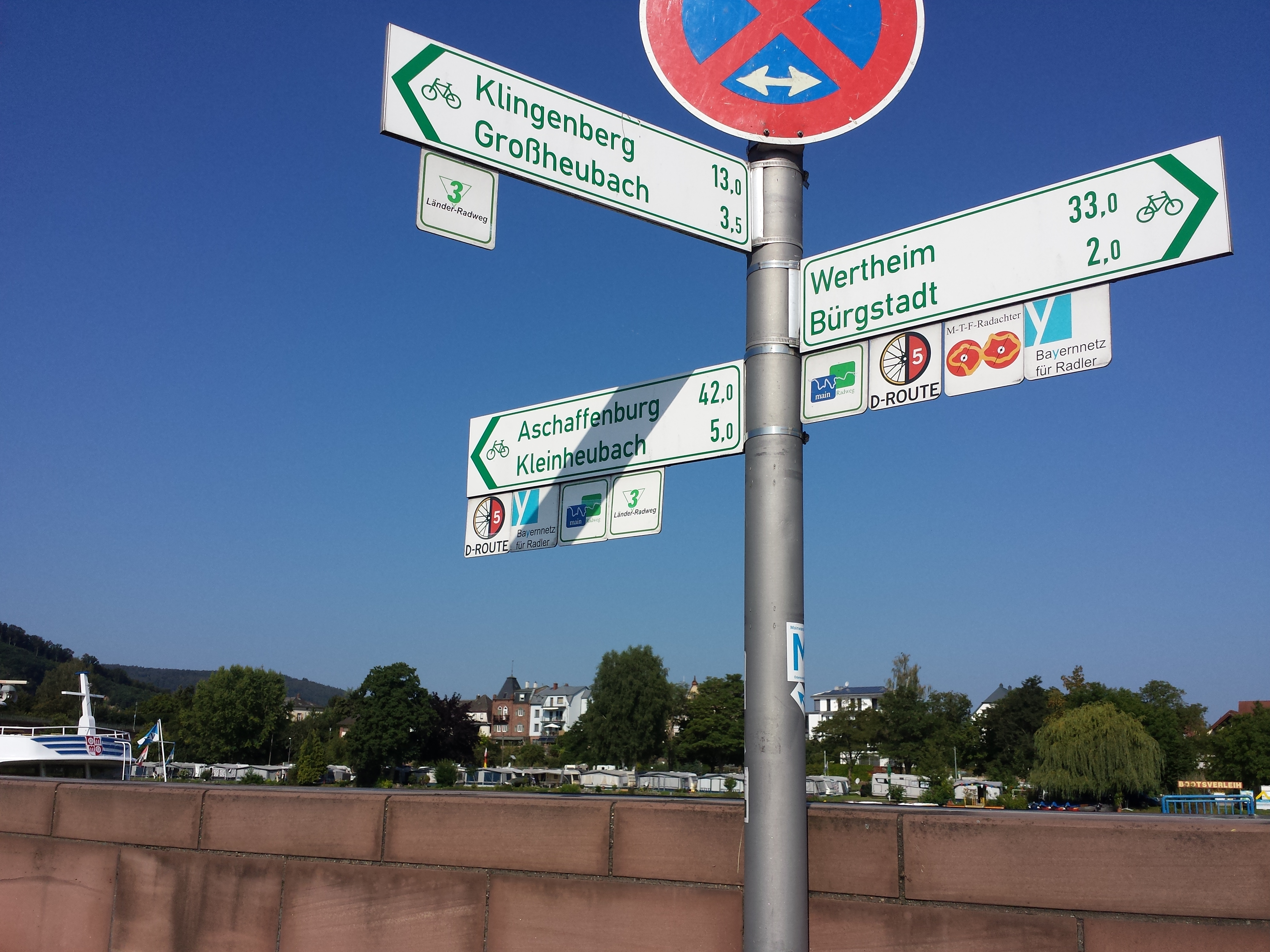 Ein Hinweisschild für den Main-Tauber-Fränkischen Rad-Achter an einer Radwegekreuzung in Miltenberg.